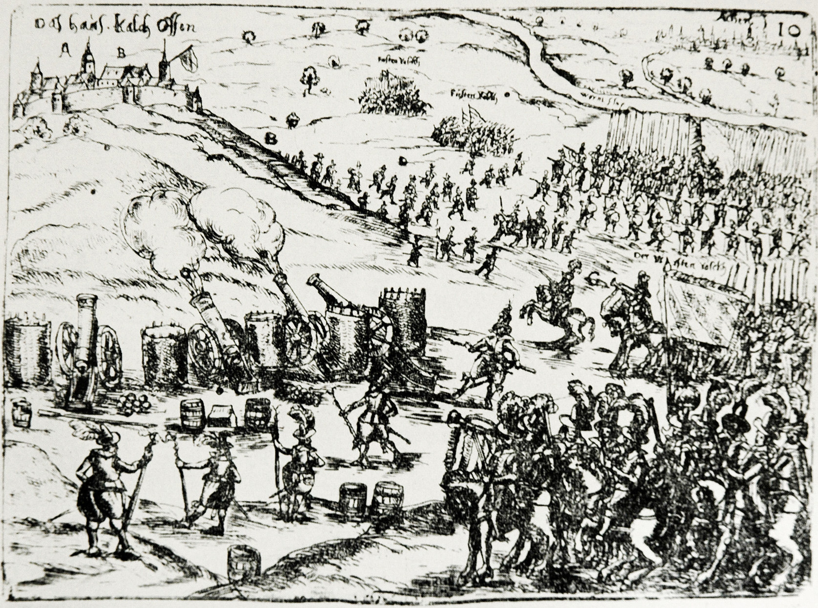 Belagerung des von kaiserlichen Soldaten besetzten Guts Kalkofen durch den Pfälzischen General Friedrich zu Solms